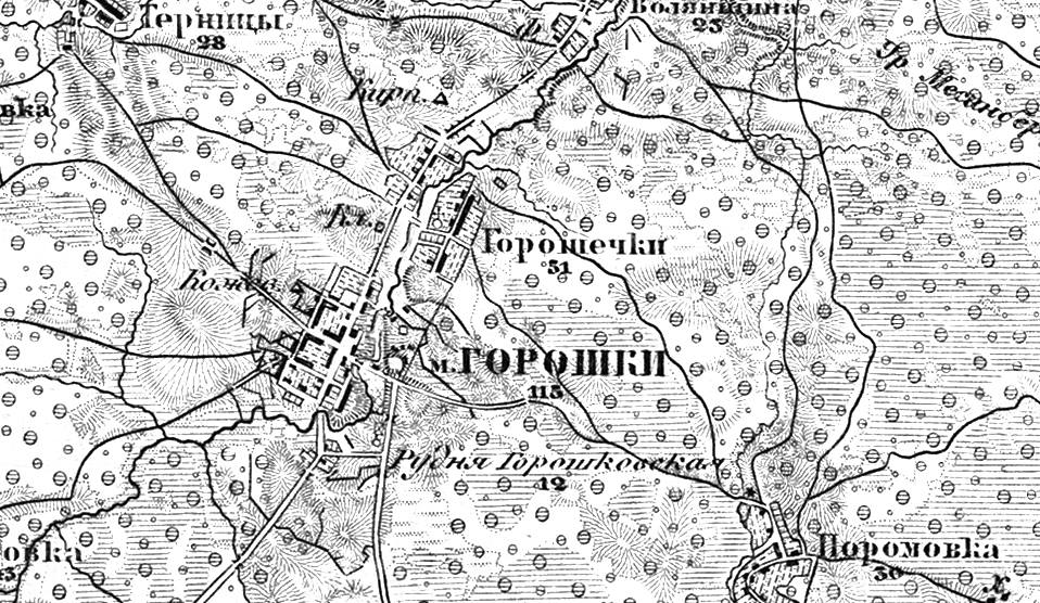 Военно-топографическая карта Российской Империи 1846-1863 гг. (издавалась до 1919 г.), созданная под руководством Ф.Ф. Шуберта и П.А. Тучкова. Масштаб: 3 версты на дюйм. Ряд: XXII, лист: 7. Показаны территории: Волынской губернии, Киевской губернии